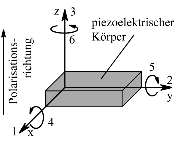 Piezoelektrizität: Definition der Achsenrichtungen